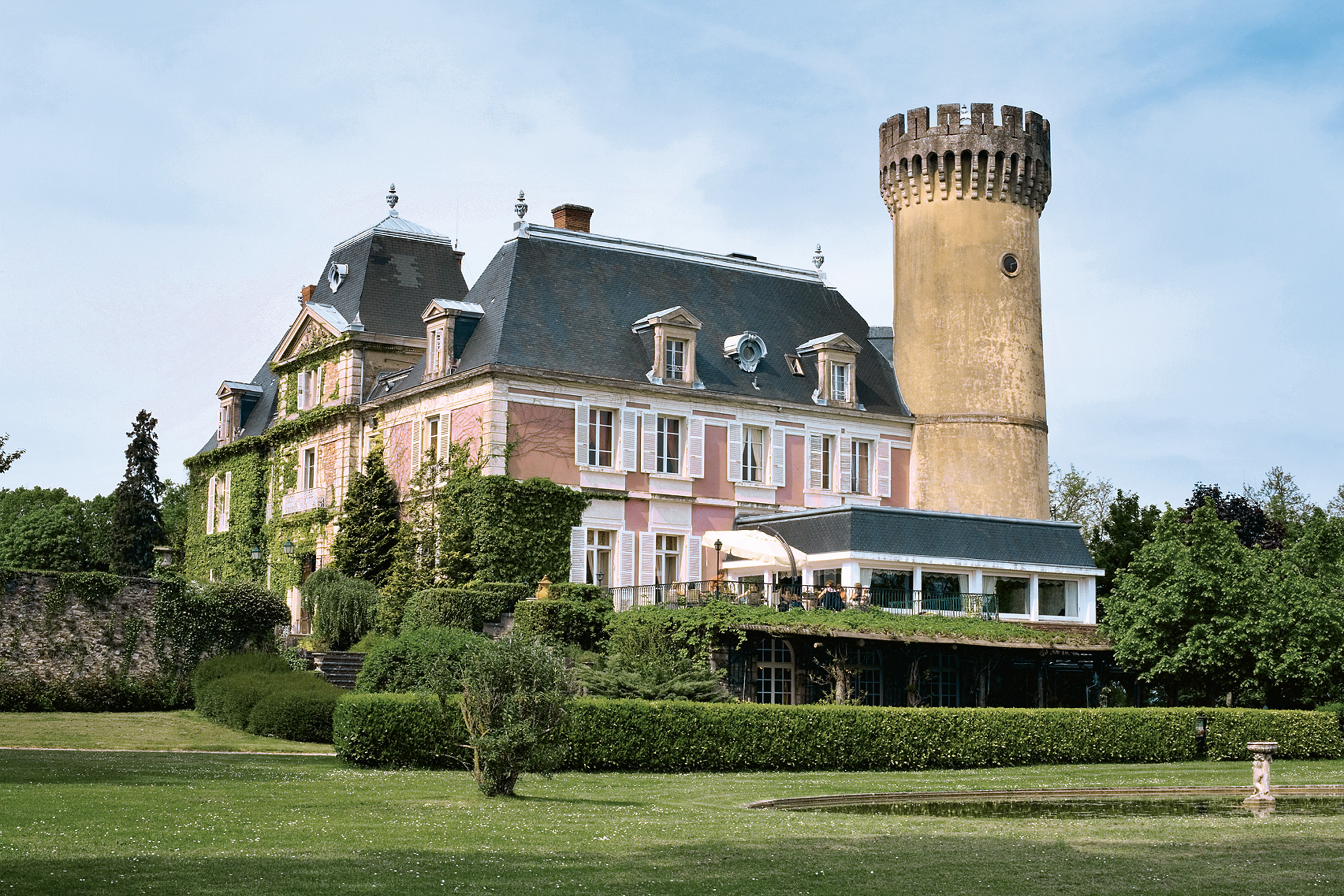 Façade extérieure du château